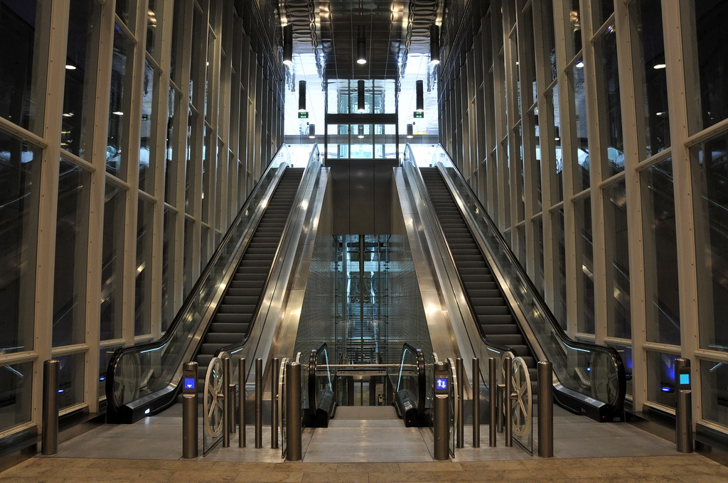 Het station ligt op een diepte van 18 meter onder straatniveau van de Statenweg en is hiermee het diepst gelegen metrostation in Rotterdam. Op 16 augustus 2010 vond de officiële opening plaats. Hiermee krijgen ook Voorburg, Leidschendam, Nootdorp, Pijnacker en Berkel en Rodenrijs een rechtstreekse verbinding met het centrum van Rotterdam. Er is één spoor in gebruik genomen worden, ingebruikname van het tweede spoor is voorzien voor 2011. Het station ligt aan de Rotterdamse metrolijn E (Rotterdam Centraal - Den Haag Centraal). De treinen rijden tot 2011 om het kwartier met extra lange treinstellen, daarna om de 10 minuten. De rit van CS naar CS duurt ca 30 minuten. In het Rotterdamse tracé (Statenwegtracé) zit een tunnel van 2,3 km lengte.